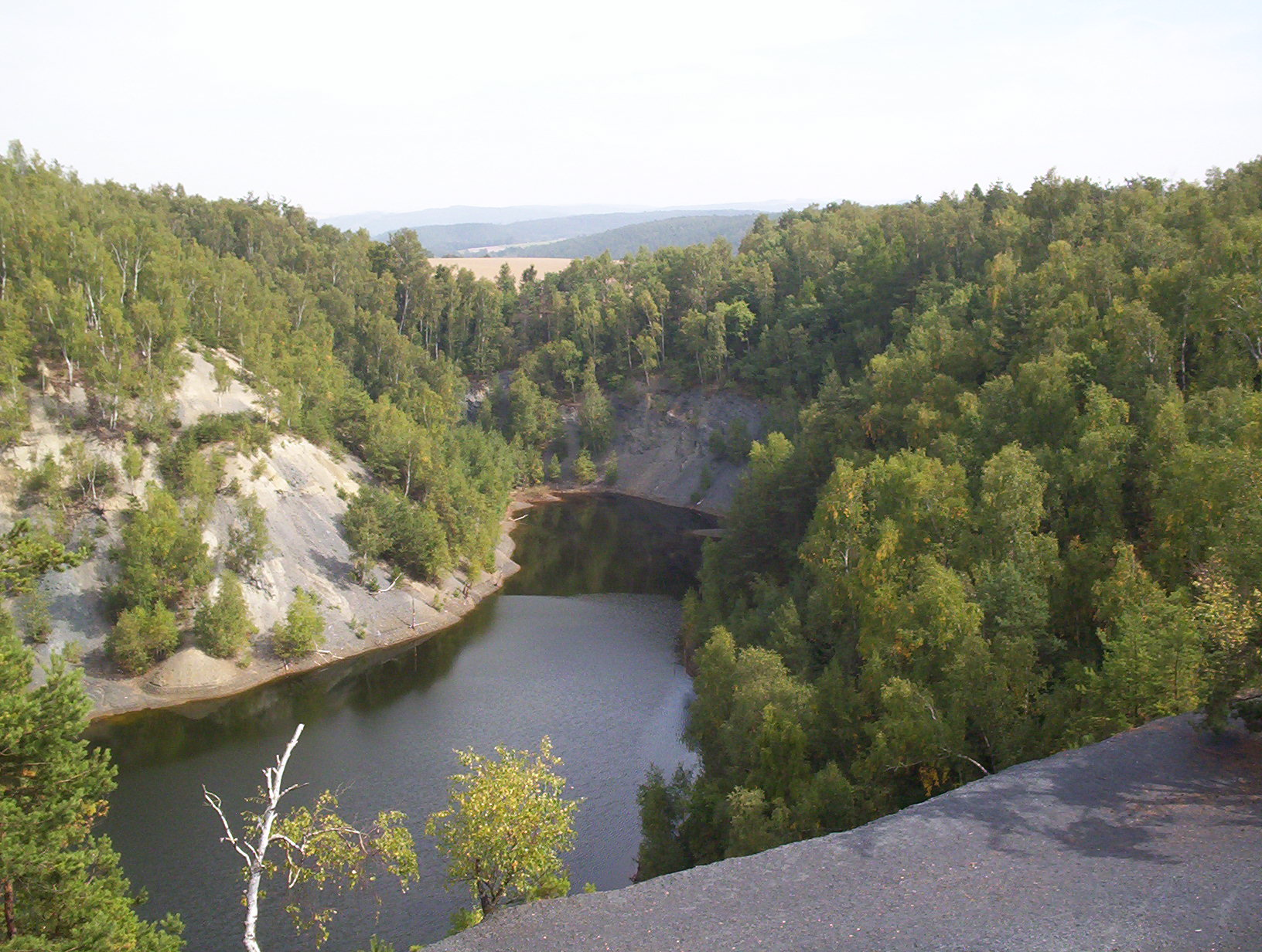 Pohled na hromnické jezírko.